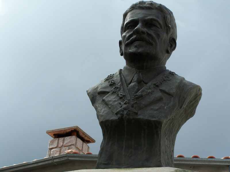 Busto de homagem ao, Dr Joaquim A Morim da Fonseca